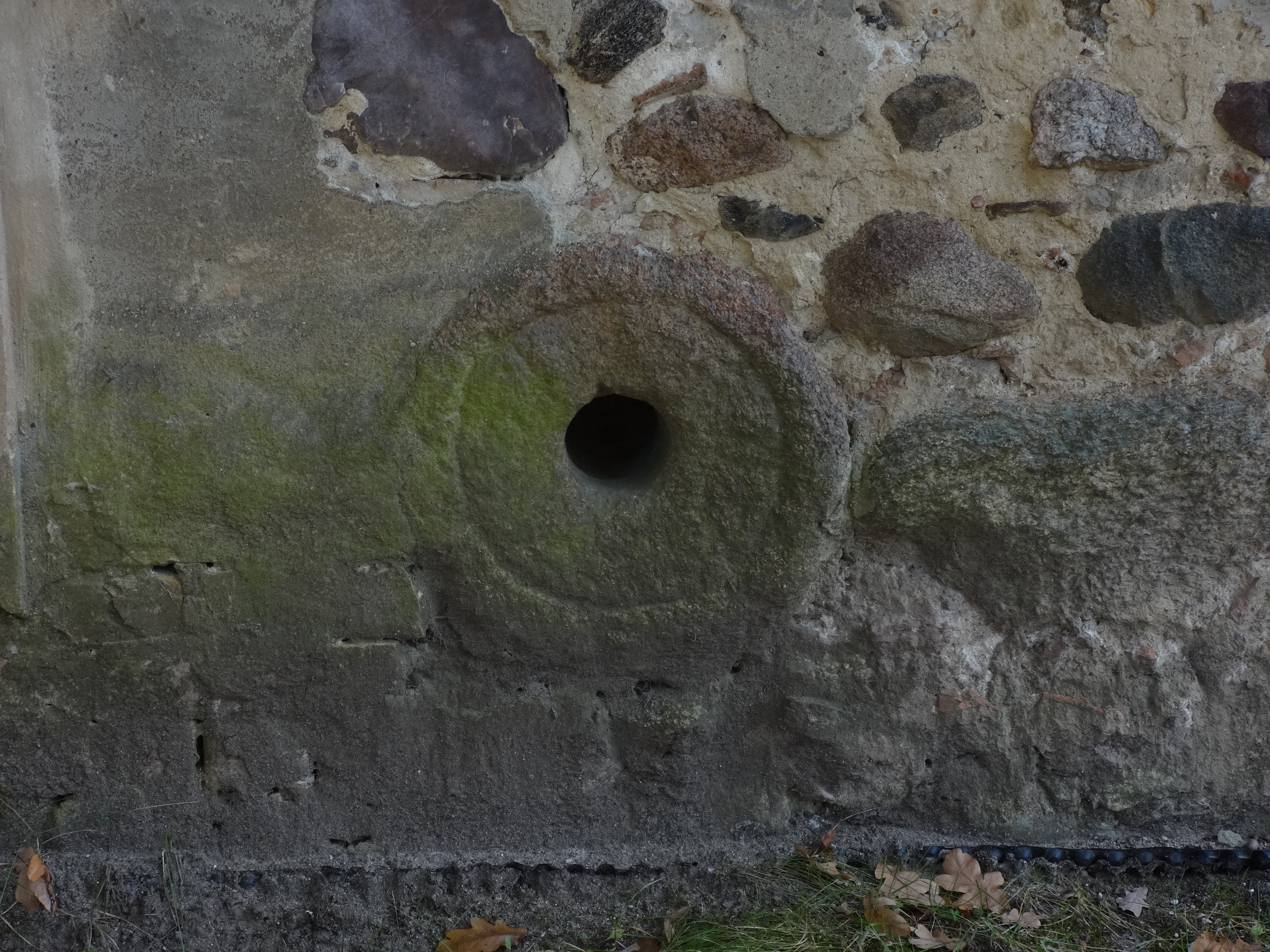 Die evangelische Kirche stammt vermutlich aus dem 14. oder 15. Jahrhundert. Sie ist aus auffällig ungleichmäßigen behauenen Feldsteinen gebaut und damit eine Besonderheit unter den Kirchen im Teltow. Im Innern befindet sich eine gotische Marienfigur aus dem 14. Jahrhundert